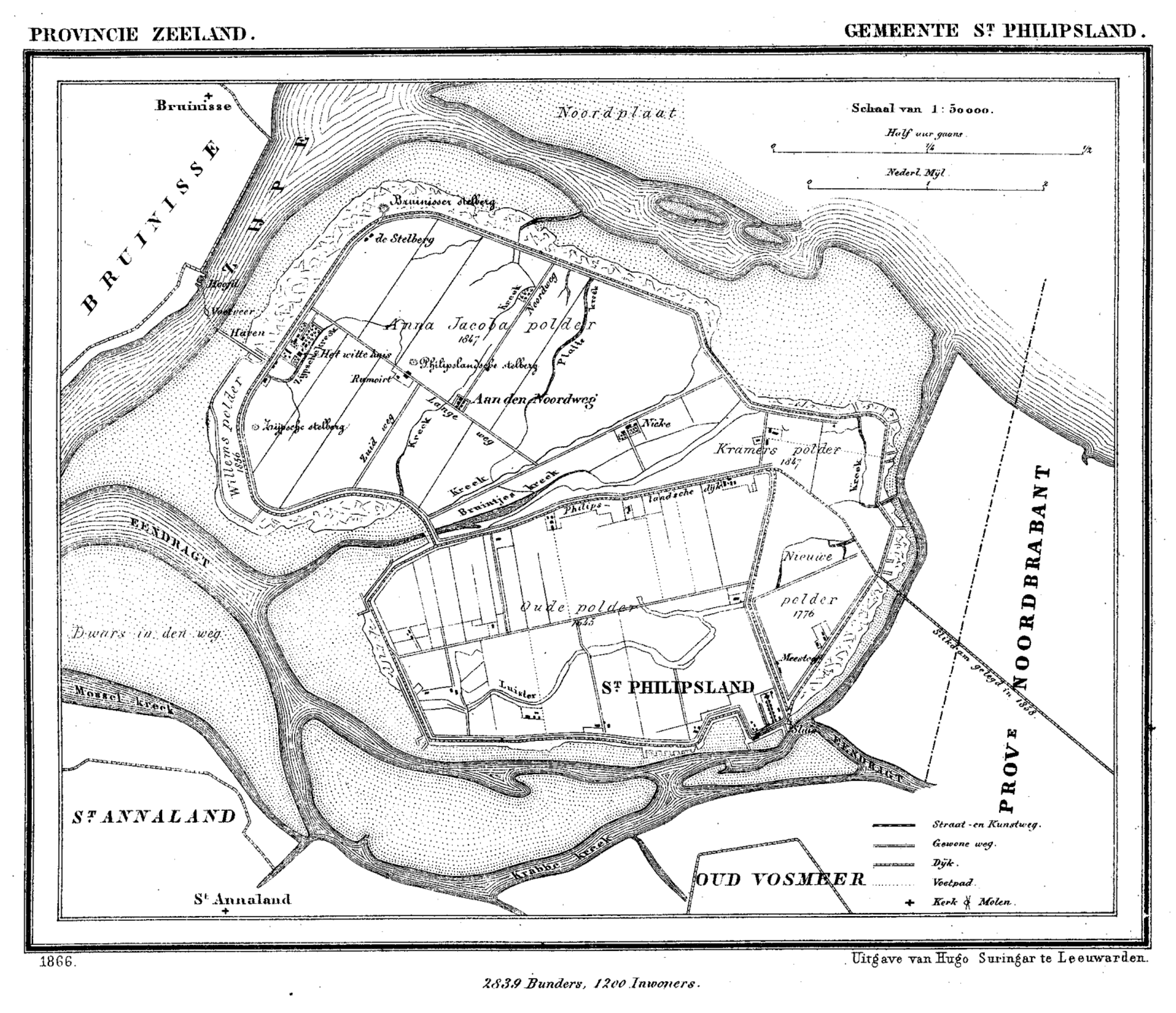 Gemeente Sint Philipsland, Zeeland, Nederland